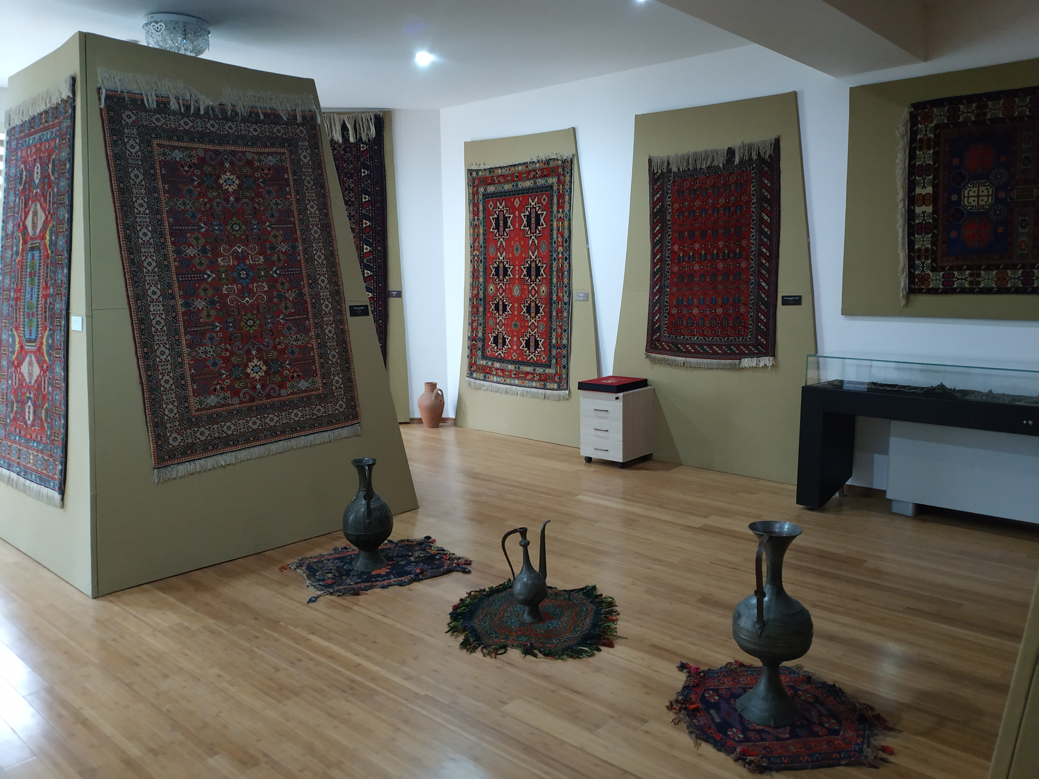 Quba Tarix - Diyarşünaslıq Muzeyi - Xalçalar guşəsi